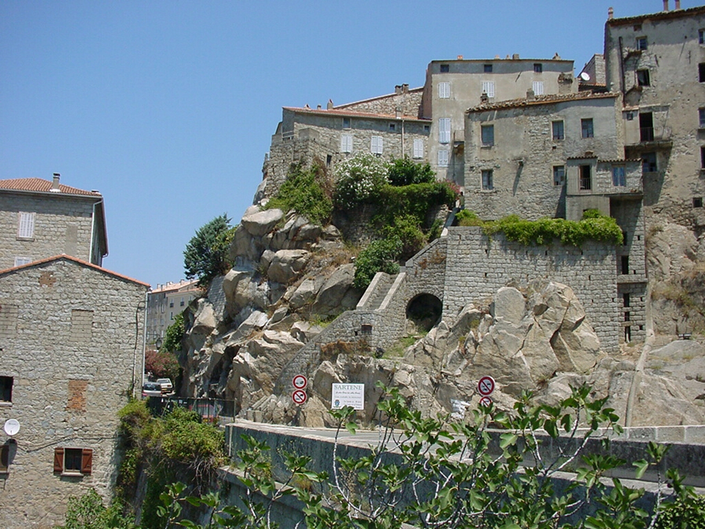 Sartene Ansicht